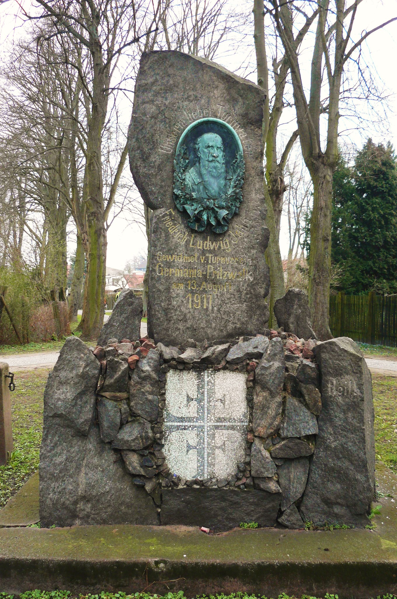 Pritzwalk.